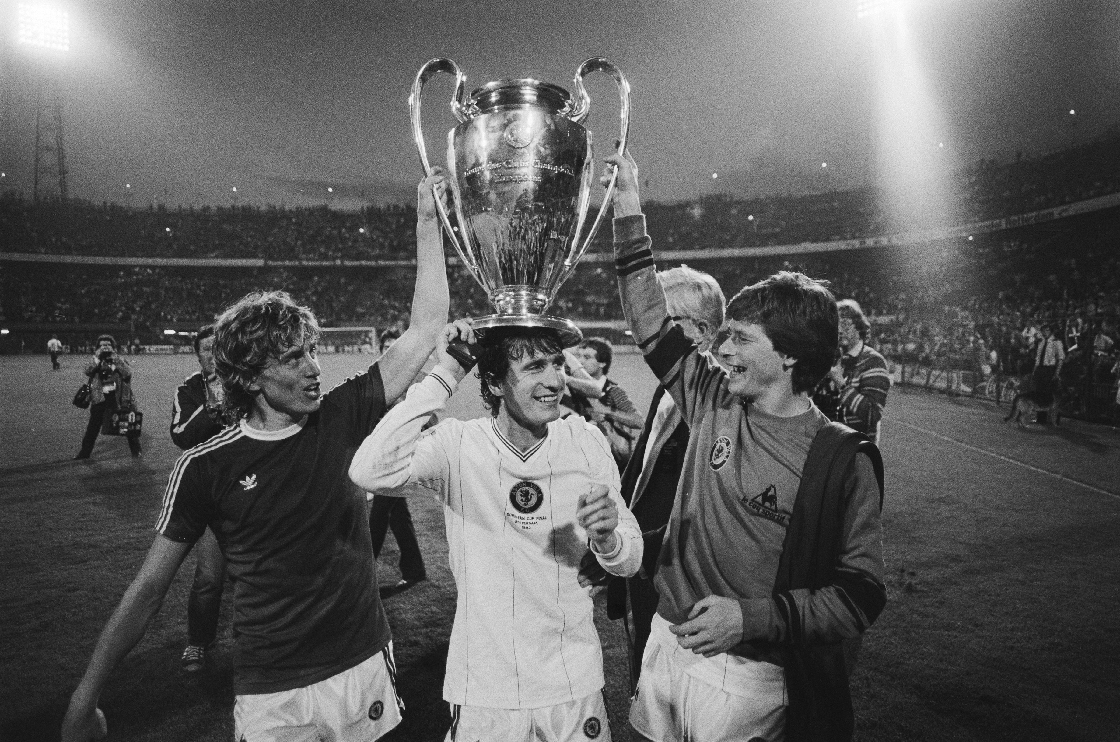 Collectie / Archief : Fotocollectie Anefo Reportage / Serie : [ onbekend ] Beschrijving : FC Bayern Munchen tegen Aston Villa 0-1 Europa Cup I blijde Aston Villa spelers met de Cup Datum : 26 mei 1982 Trefwoorden : sport, voetbal Persoonsnaam : Aston Villa, CUP, FC Bayern Munchen Fotograaf : Antonisse, Marcel / Anefo Auteursrechthebbende : Nationaal Archief Materiaalsoort : Negatief (zwart/wit) Nummer archiefinventaris : bekijk toegang 2.24.01.05 Bestanddeelnummer : 932-1808